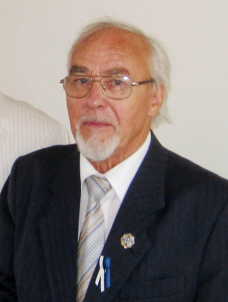 Uno Ugandi